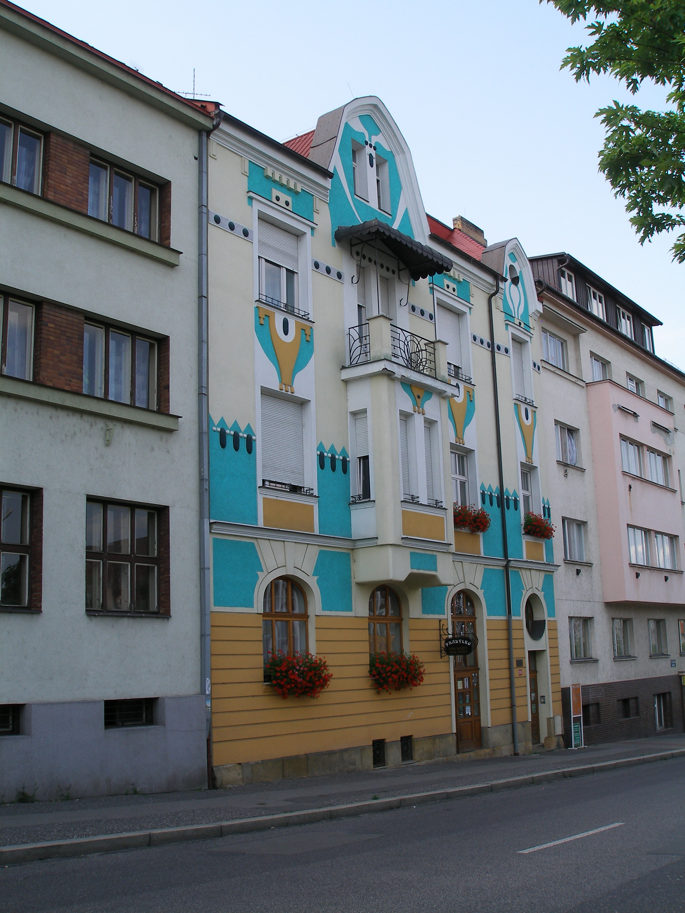 Rodný dům Adiny Mandlové v Mladé Boleslavi na třídě Václava Klementa číslo popisné 252.